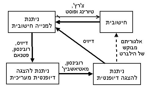 תכונות של קבוצות - איור לצורך הבעיה העשירית של הילברט made by: he:משתמש:עוזי ו.